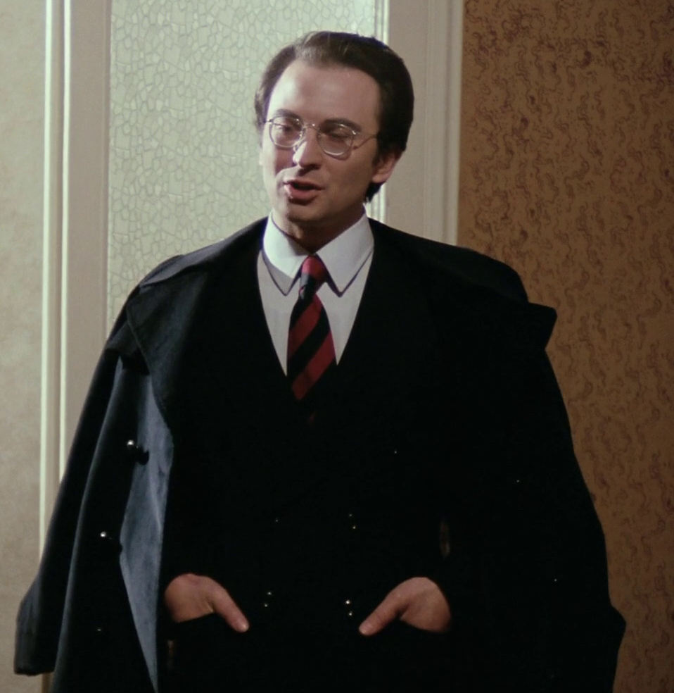 scena dal film Amici miei